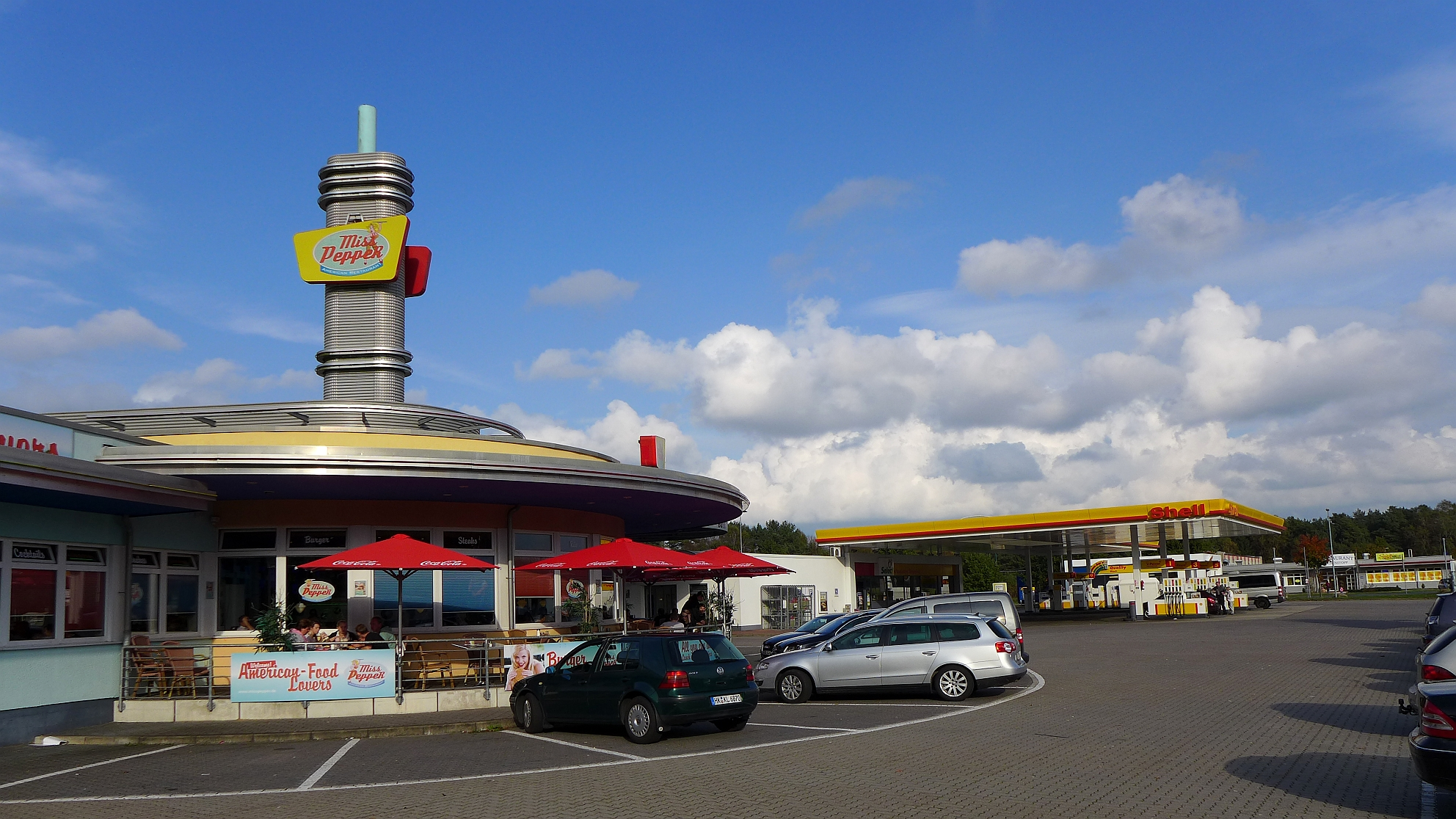 Autohof und Truck Stop Soltau Süd an der Bundesautobahn 7 im Landkreis Heidekreis.